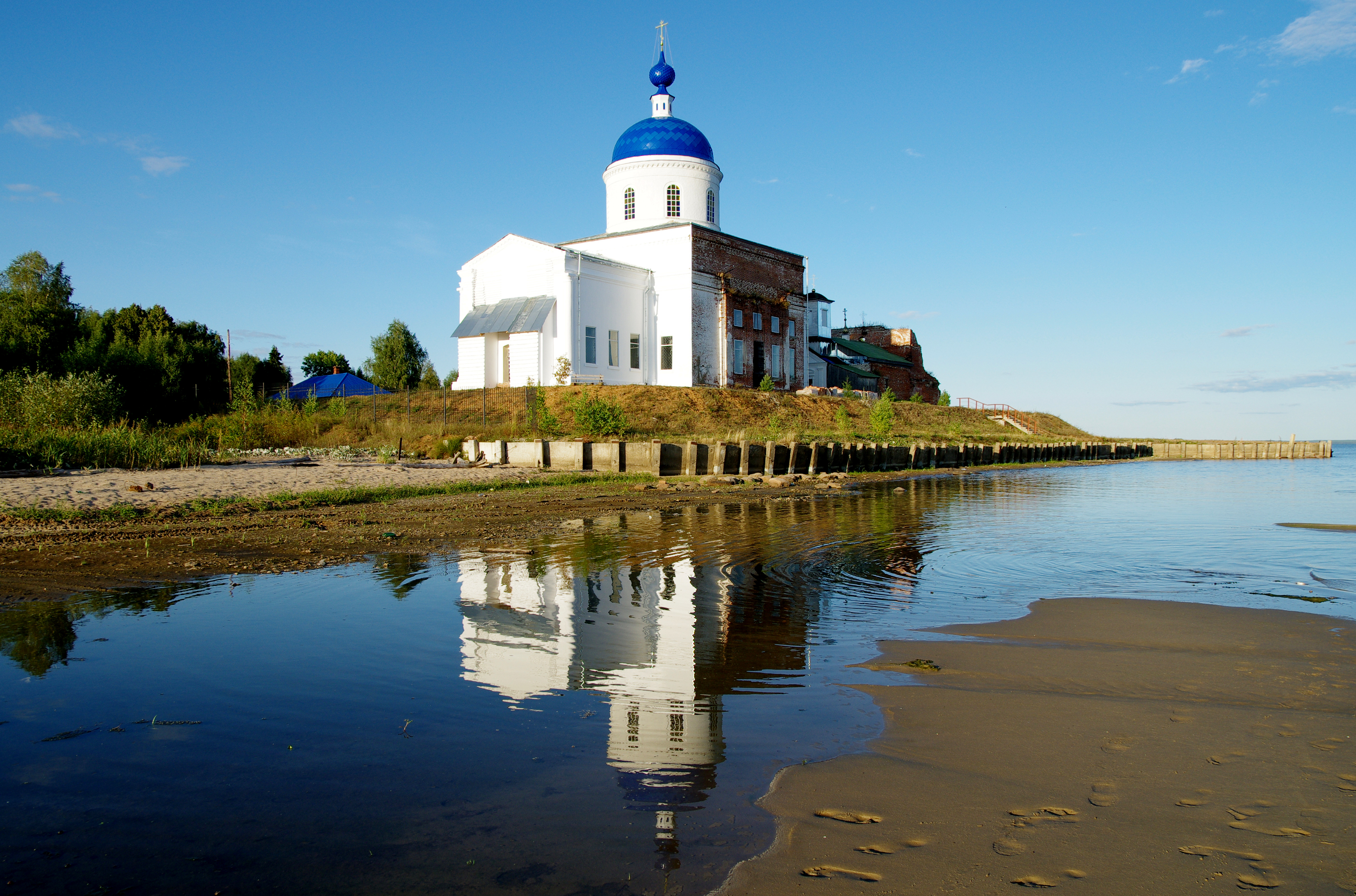 Ансамбль: Завражье, Кадыйский район, Костромская область